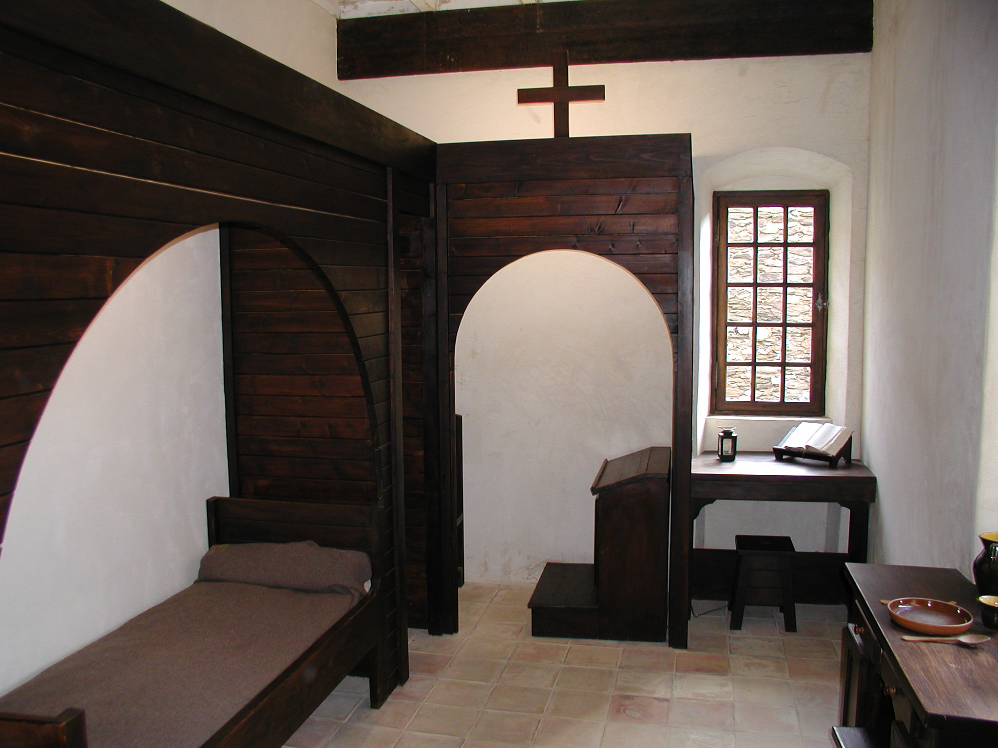 Chartreuse de la Verne - A frias housing inside